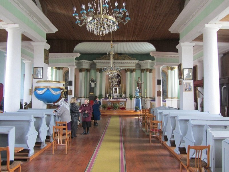 Жырмуны. Касцёл Адшукання Святога Крыжа